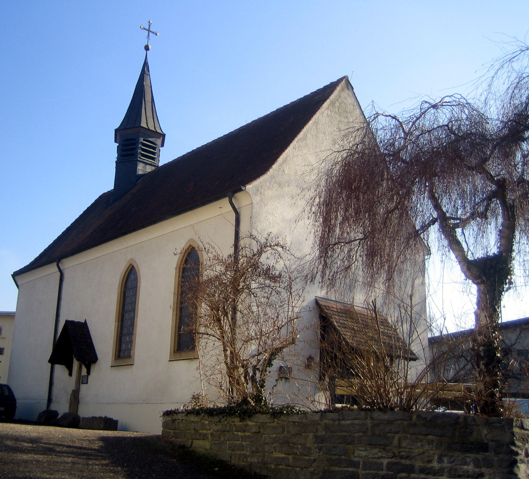 Kapelle Sankt Nikolaus in Rheinweiler